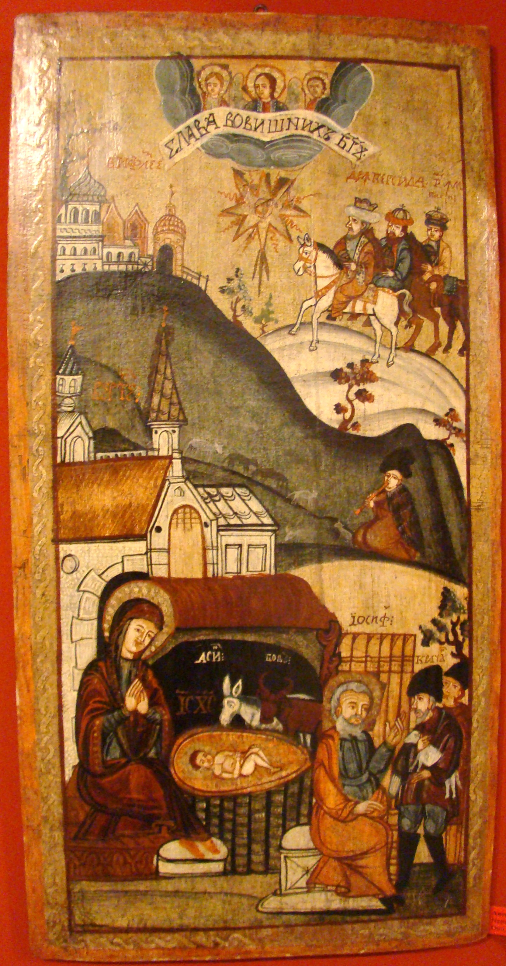 Icoană care a aparținut bisericii de lemn din Osoi